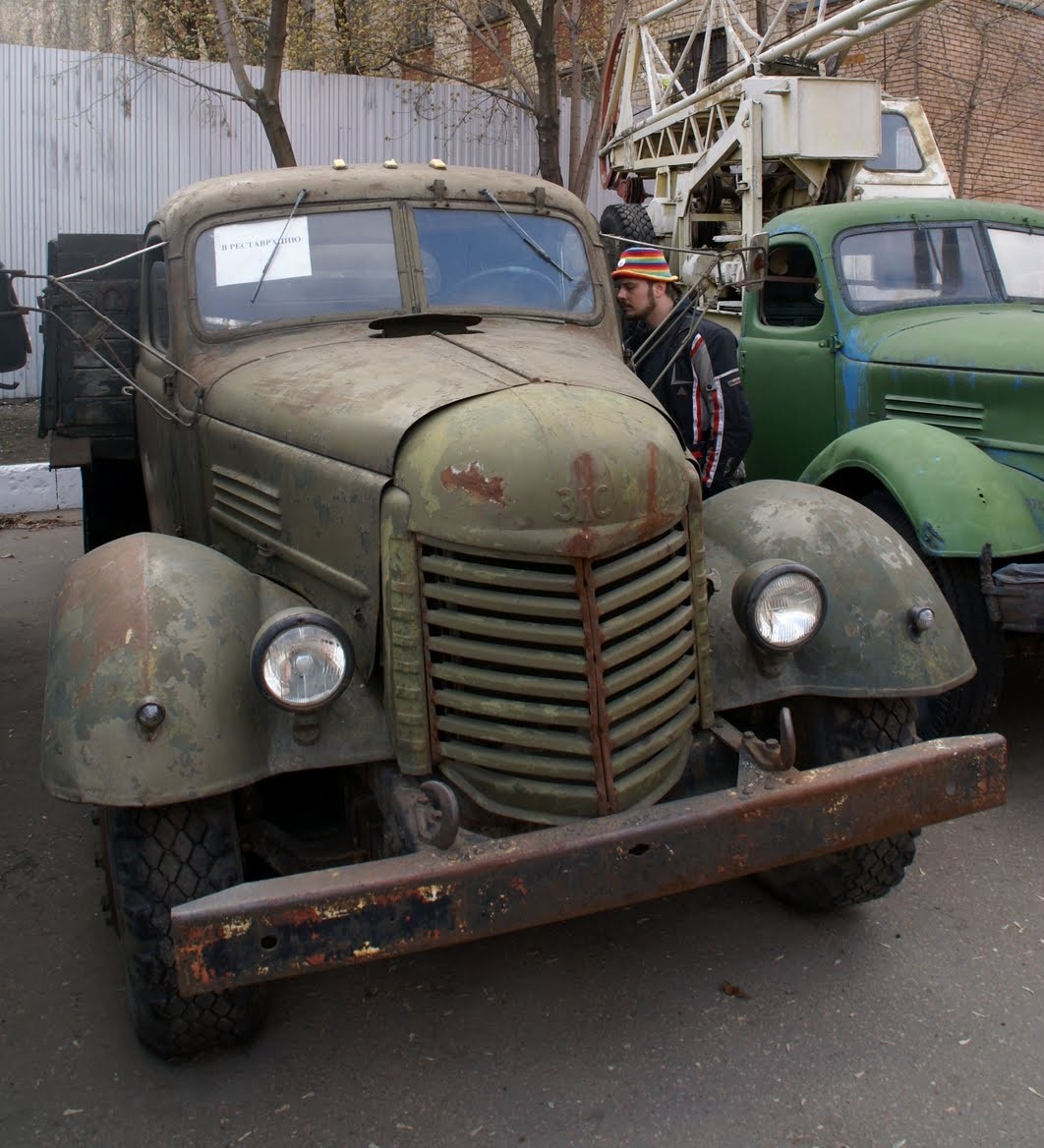 ЗИС-150, не прошедший реставрацию